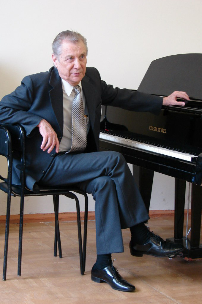 Советский, российский и марийский композитор Андрей Яковлевич Эшпай.